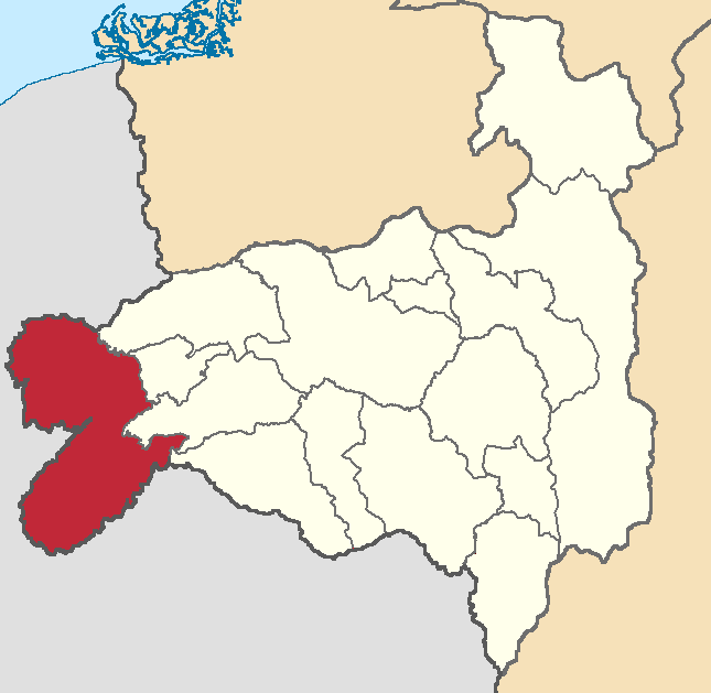 Mapa localizador del cantón en Loja, Ecuador